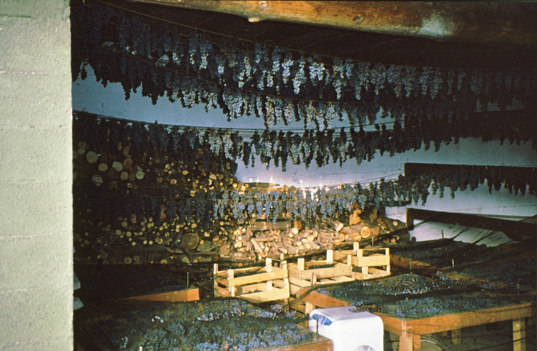 Vecchio Metodo di appassimento del Moscato di Scanzo